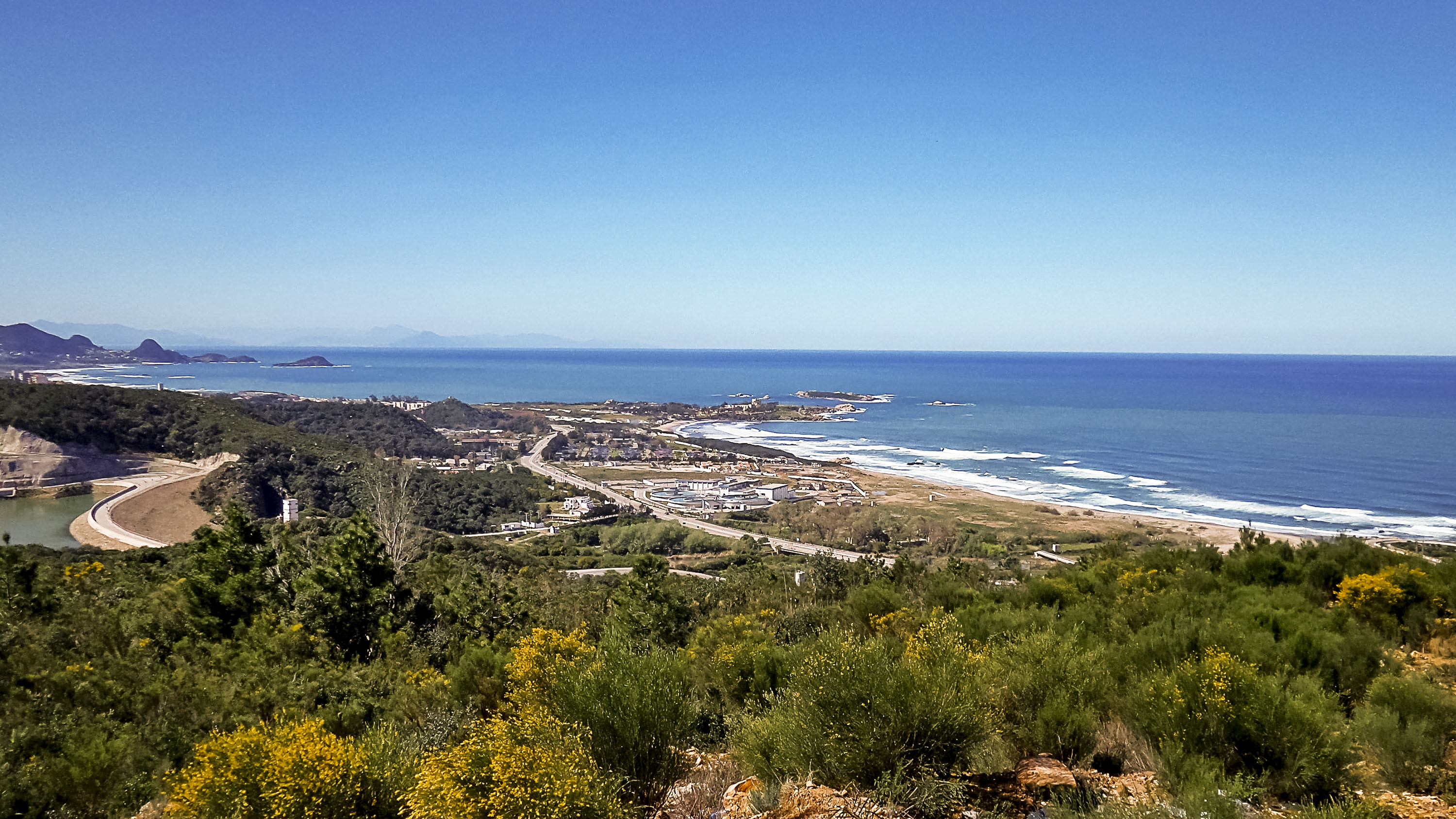 Barrage de Oued Kissir سد واد كيسيرBarrage de Oued Kissir, wilaya de Jijel سد واد كيسير، ولاية جيجل